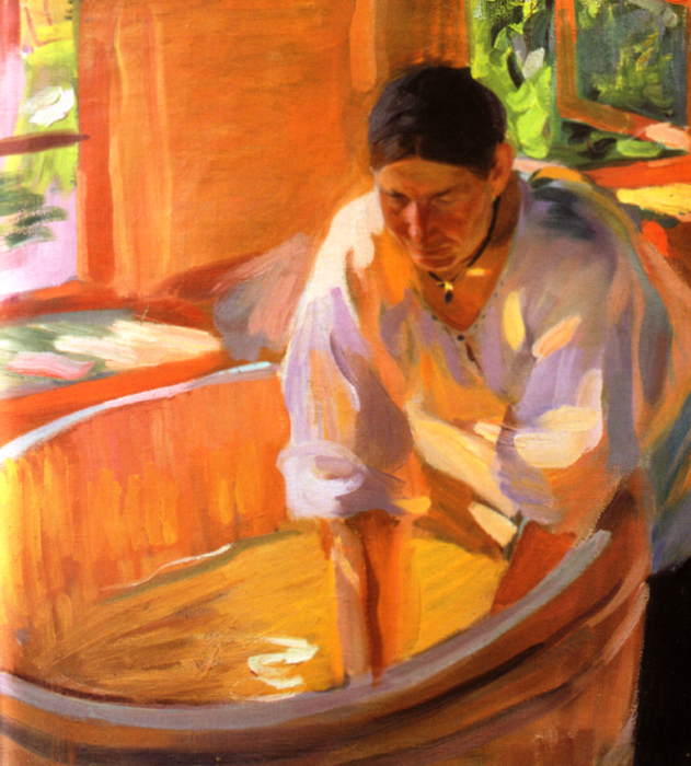 Ukrainian: Прачкаtitle QS:P1476,uk:"Прачка" label QS:Luk,"Прачка"